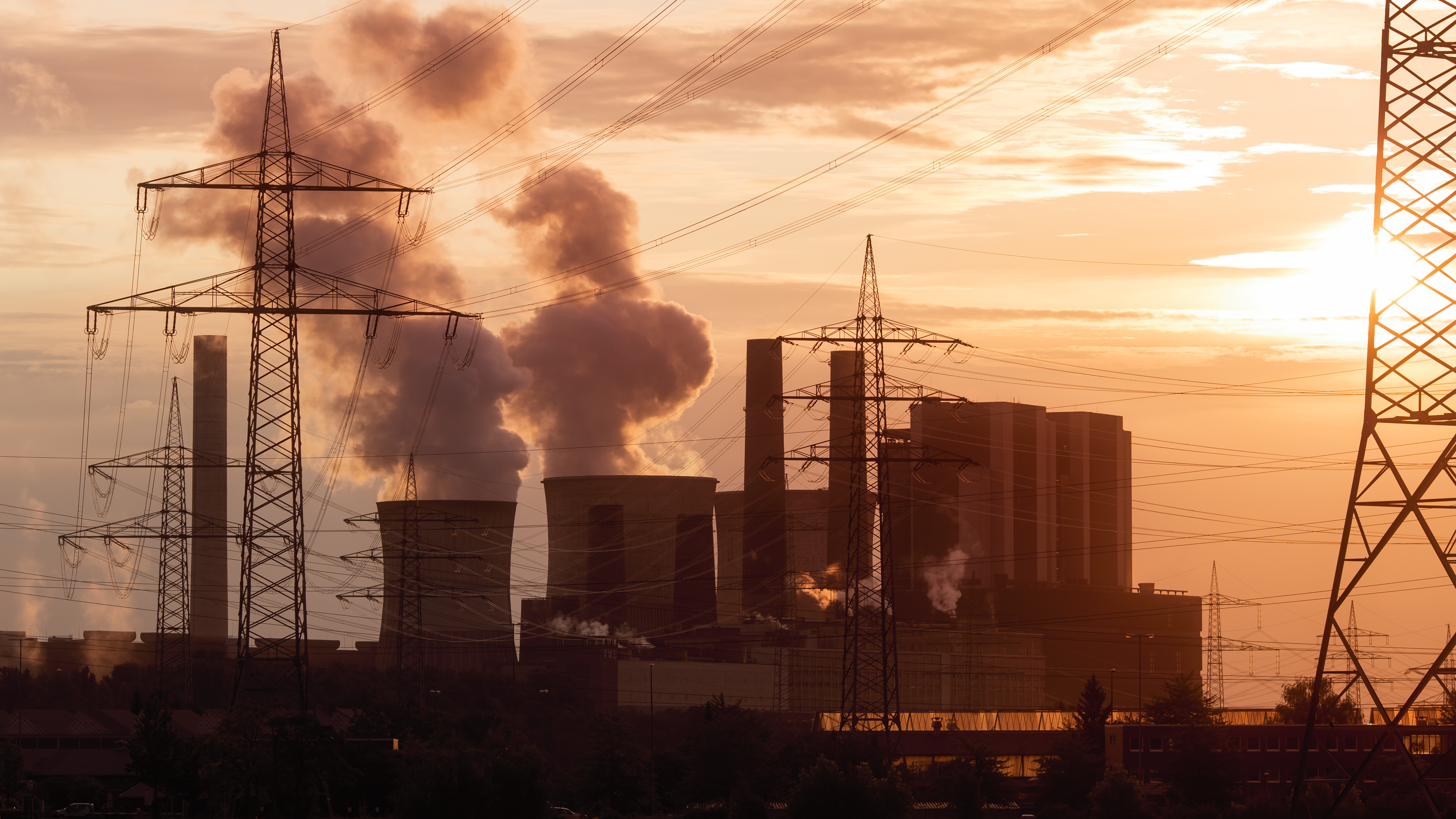 Das Kraftwerk Weisweiler (Betreiber RWE) im Sonnenaufgang